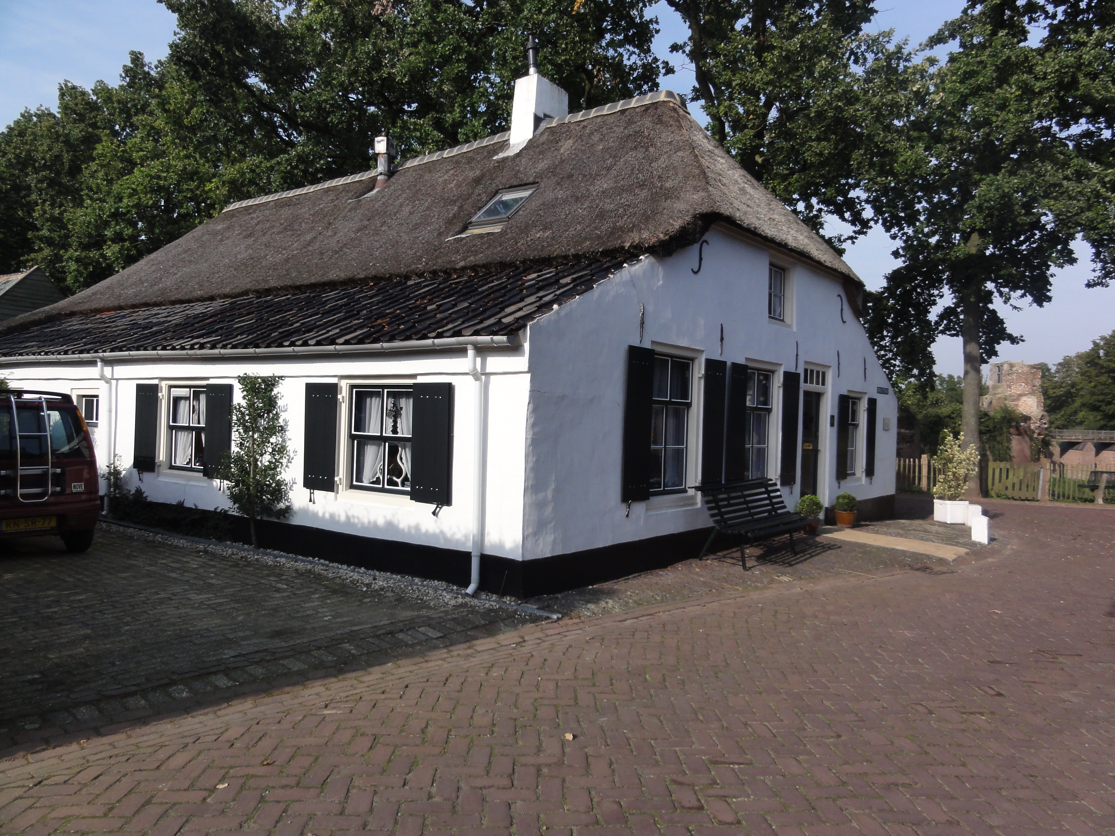 Batenburg Rijksmonument 8716 Kruisstraat 15 48″ N, 5° 37′ 47.84″ E